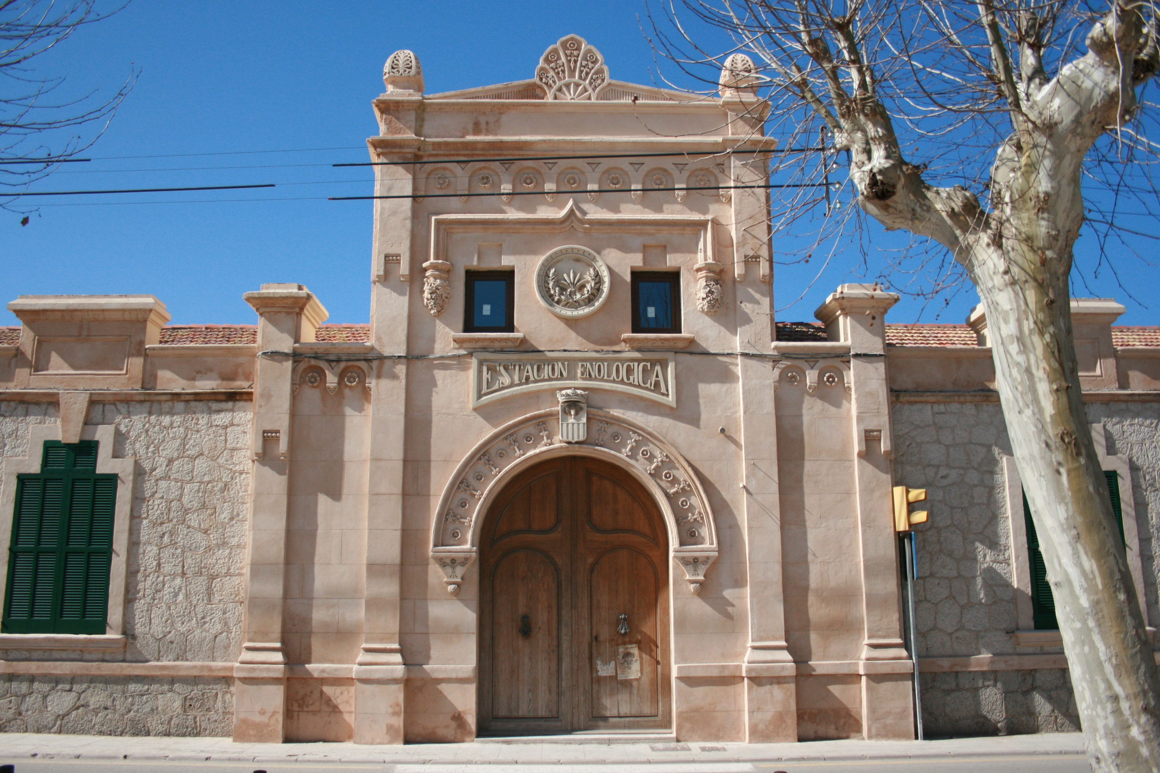 Estacion Enologica, Passeig de Ramon Llull in Felanitx